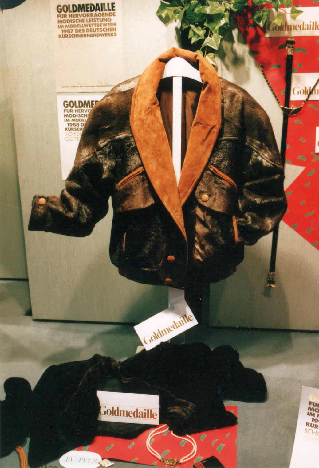 Pelzatelier Schöller, Gütersloh, Spiekergasse. Rockseal-Herrenjacke mit Veloursleder.